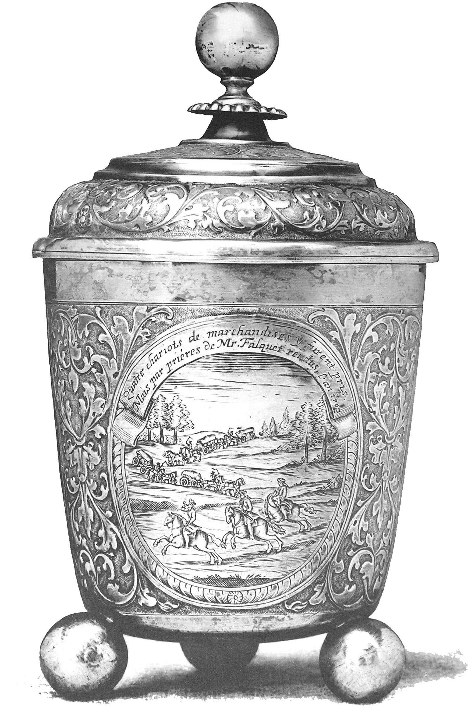 Gobelet d'André Falquet (Kunstgegenstand).